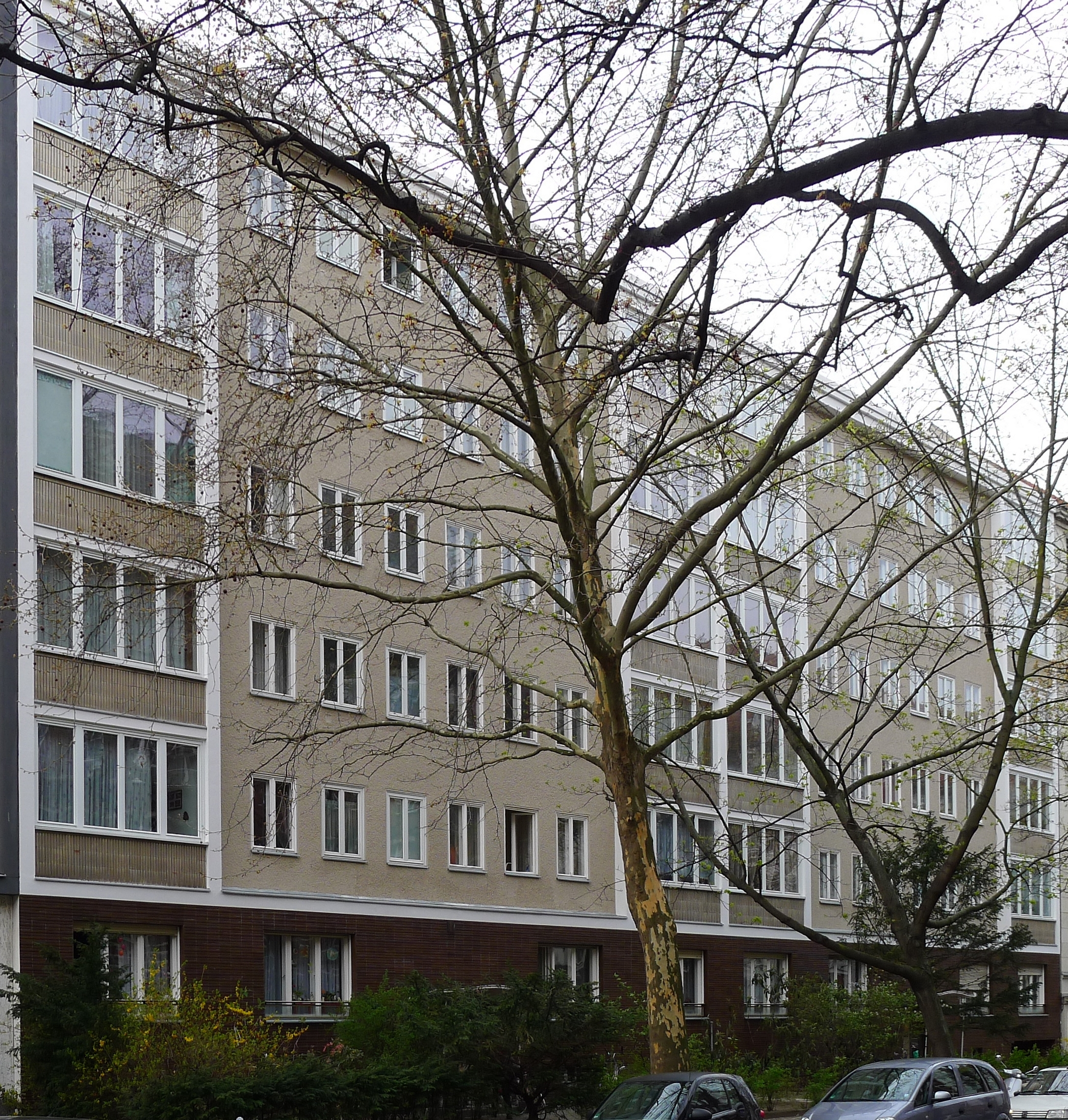 Wohnhaus